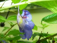 Egil J. Skarning